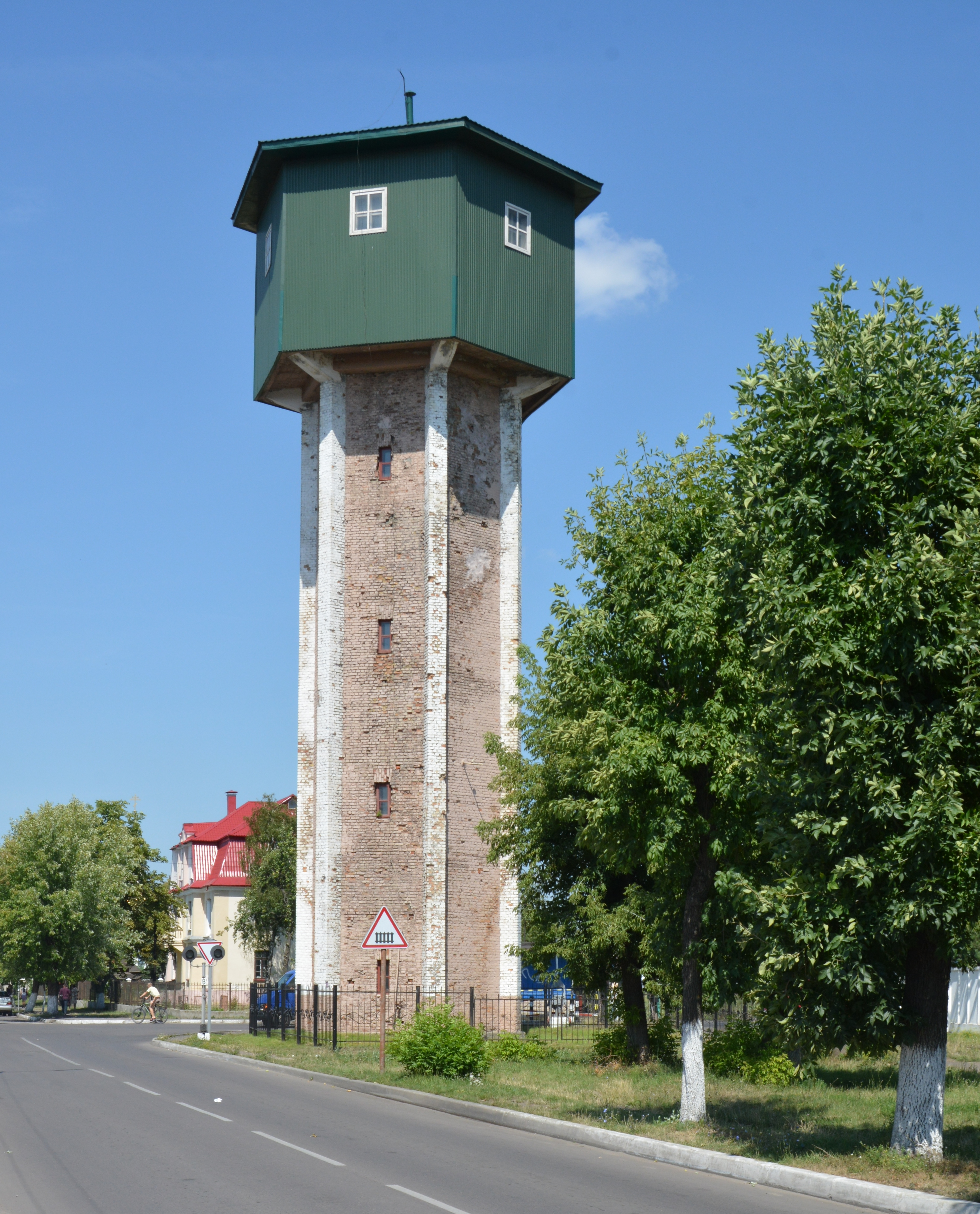 Водонапірна башта (мур.), Ковель, вул. Ветеранів, 16